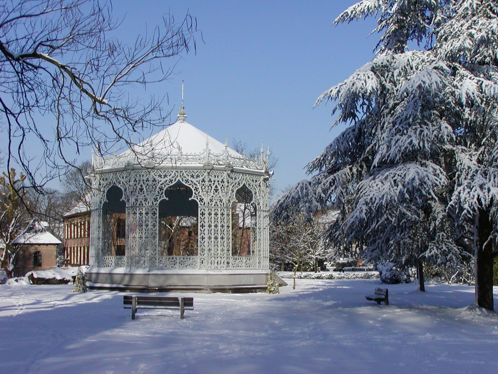 Gietijzeren muziekkiosk (1860) in eclectische stijl. Stadspark Sint-Niklaas.